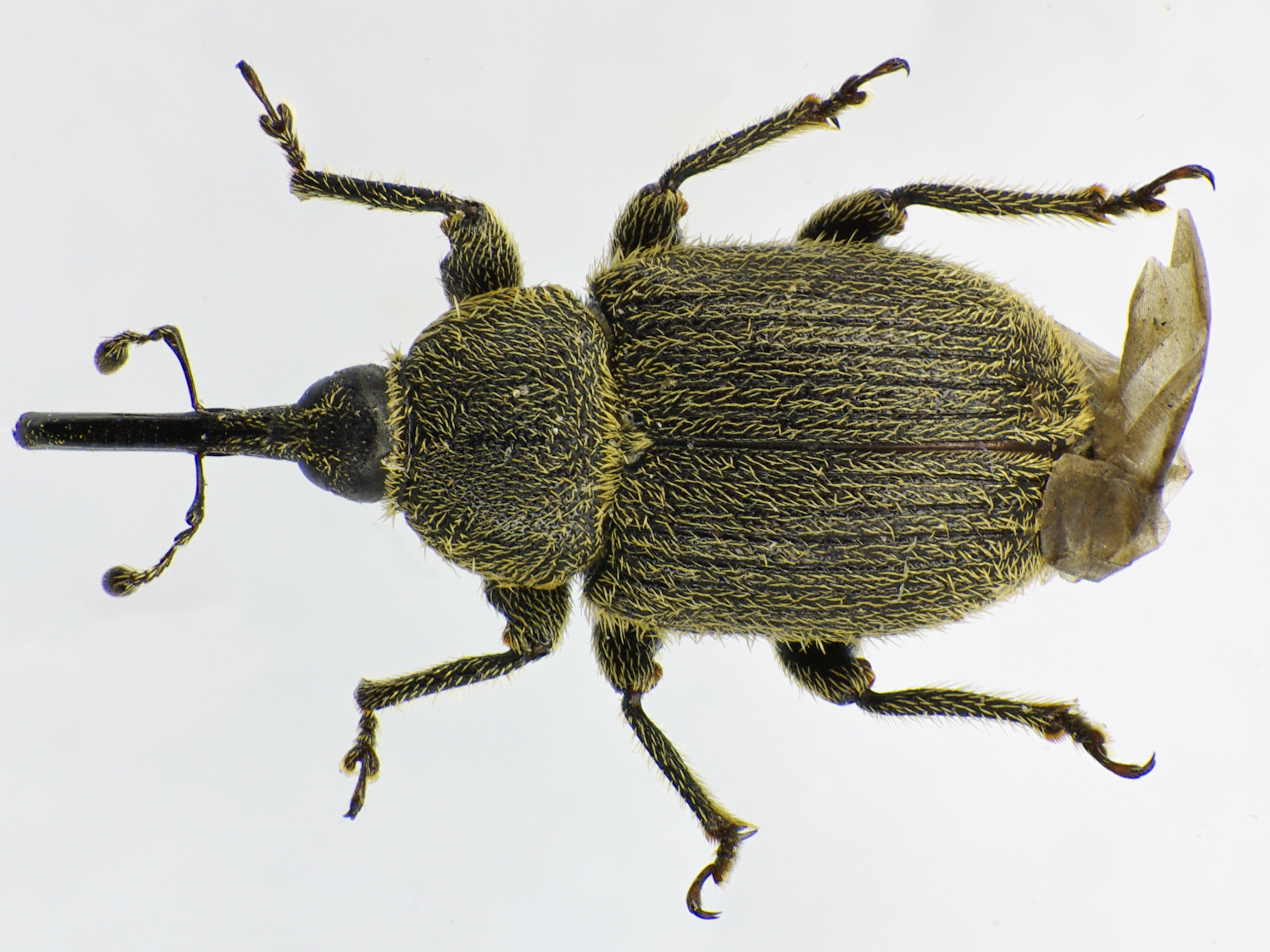 Rhinusa asellus aus Ungarn bei Nádasd am 31. Juli 2015, Aufsicht